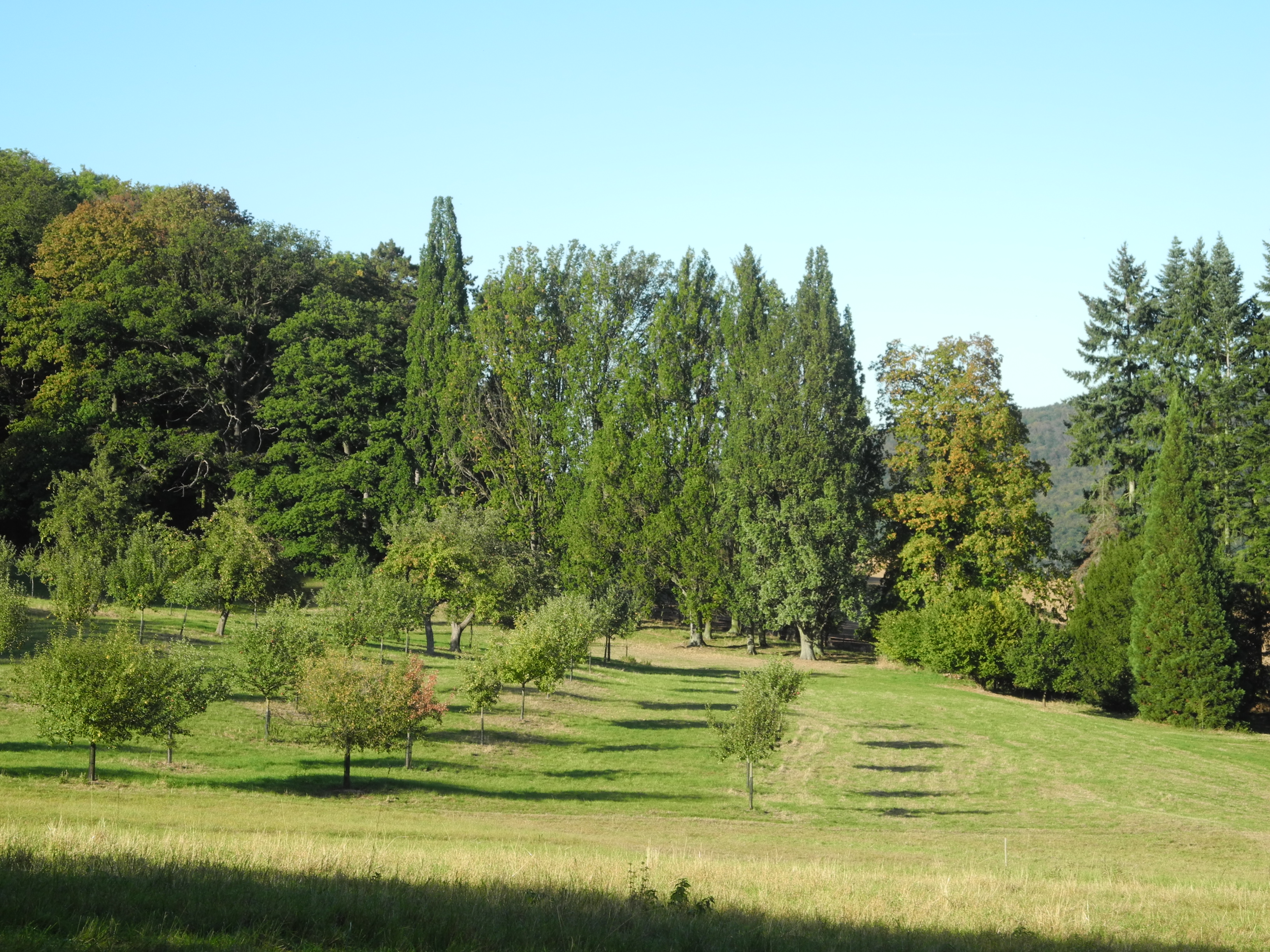 Allee der Pyramideneichen (Quercus robur 'Fastigiata' ) im Schlosspark Riede, Hessen, Deutschland. Blick von Süden über den Tiergarten.